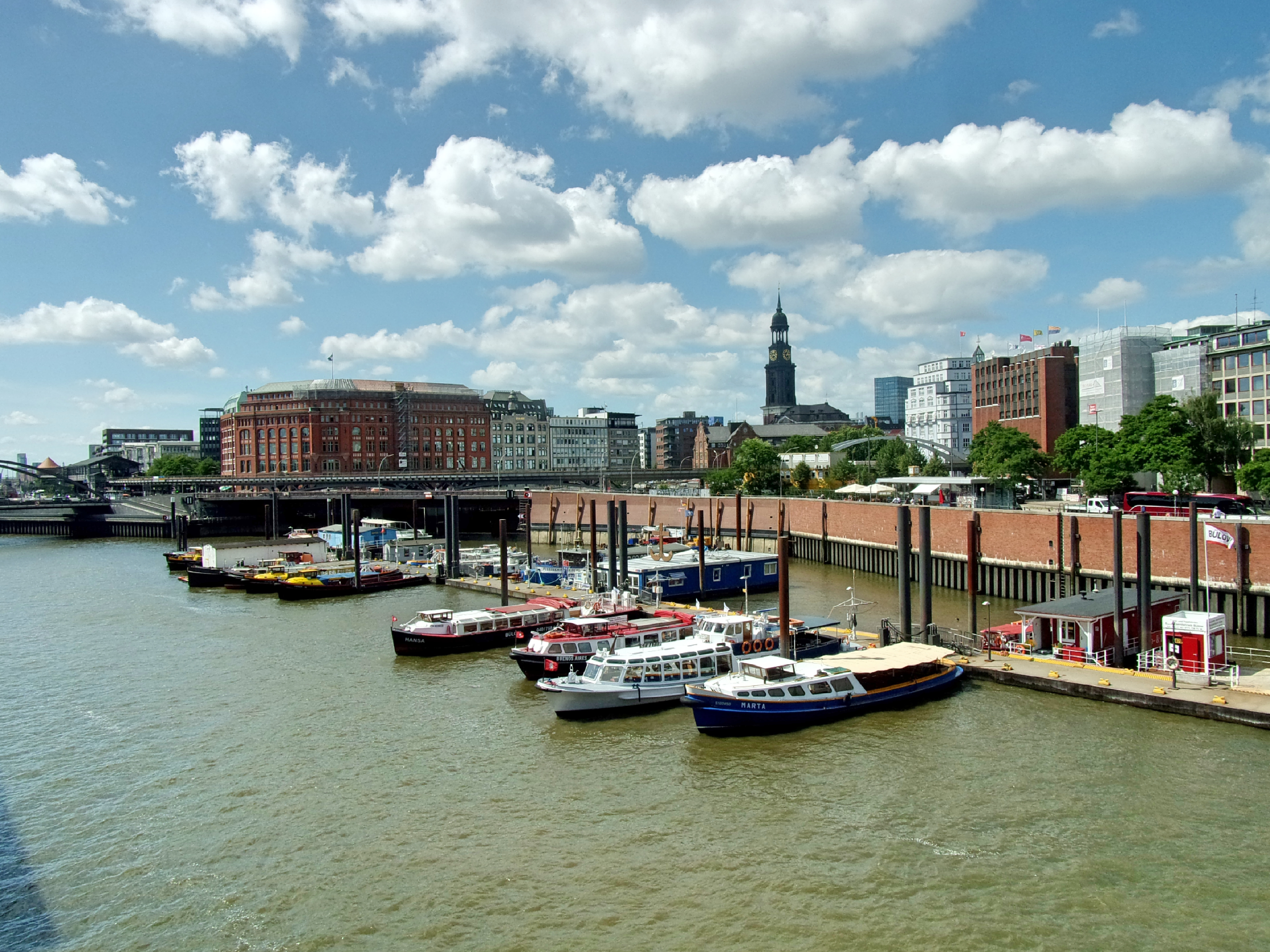 Der Hamburger Binnenhafen, Blickrichtung von Ost nach West. Barkassen, Flussschifferkirche, Kaianlagen, rechts im Hintergrund der Michel. Nachfolgende DL-Nr. gilt für den Binnenhafen.This is a photograph of an architectural monument.